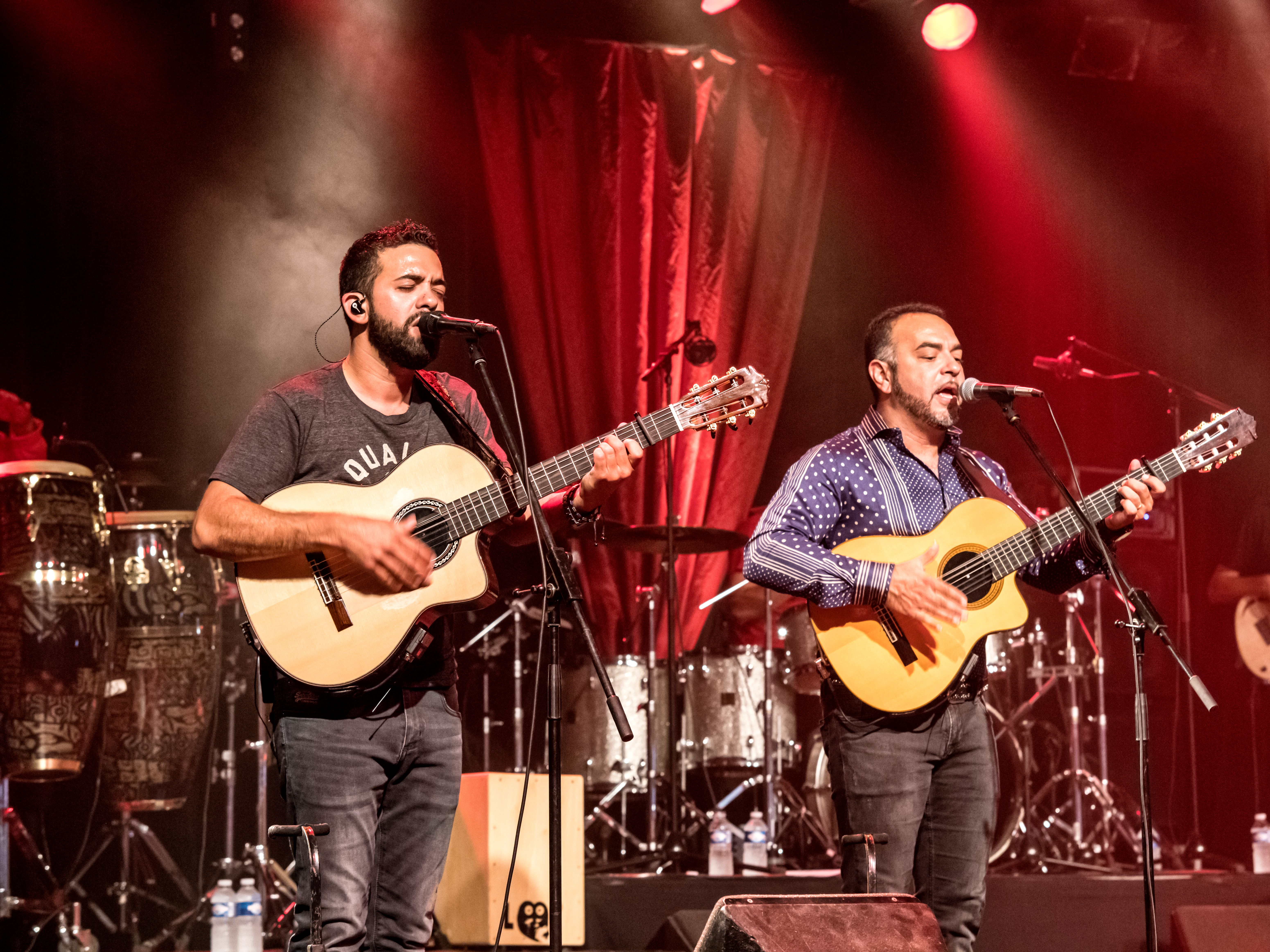 Bilder vom Zelt Musik Festival 2016 in Freiburg im Breisgau Gipsy Kings